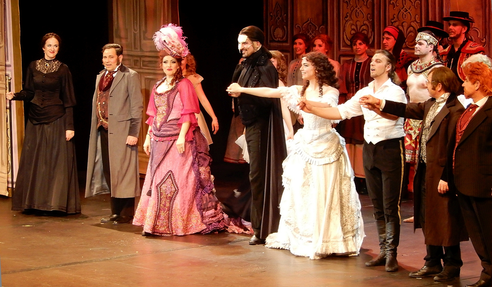 Herci druhého nastudování Fantoma opery v Praze, po představení v GoJa Music Hall 5.5.2019